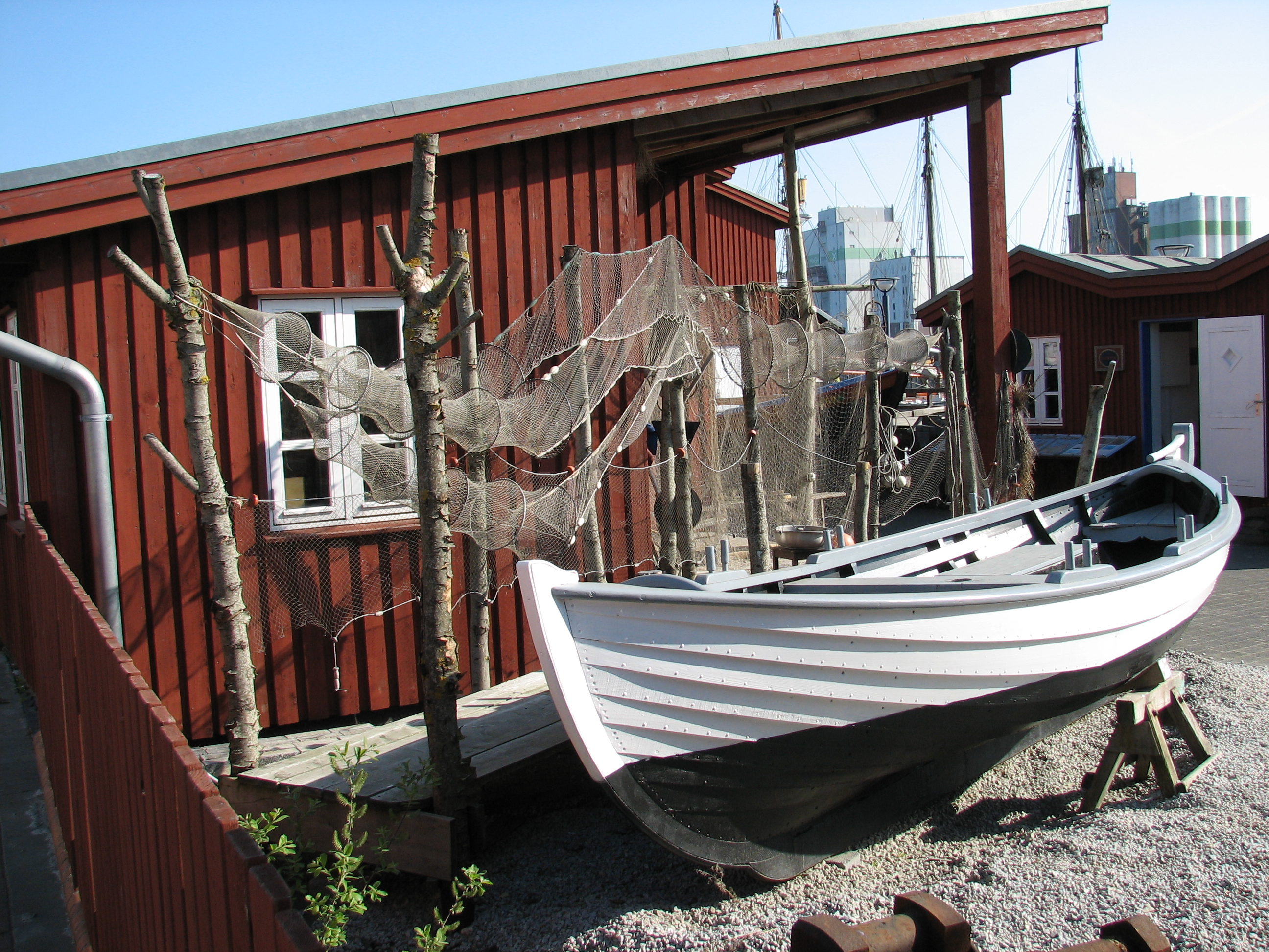 Fischerboot und -netze in der historischen Werft (Museumswerft) in Flensburg, Schleswig-Holstein, Deutschland.